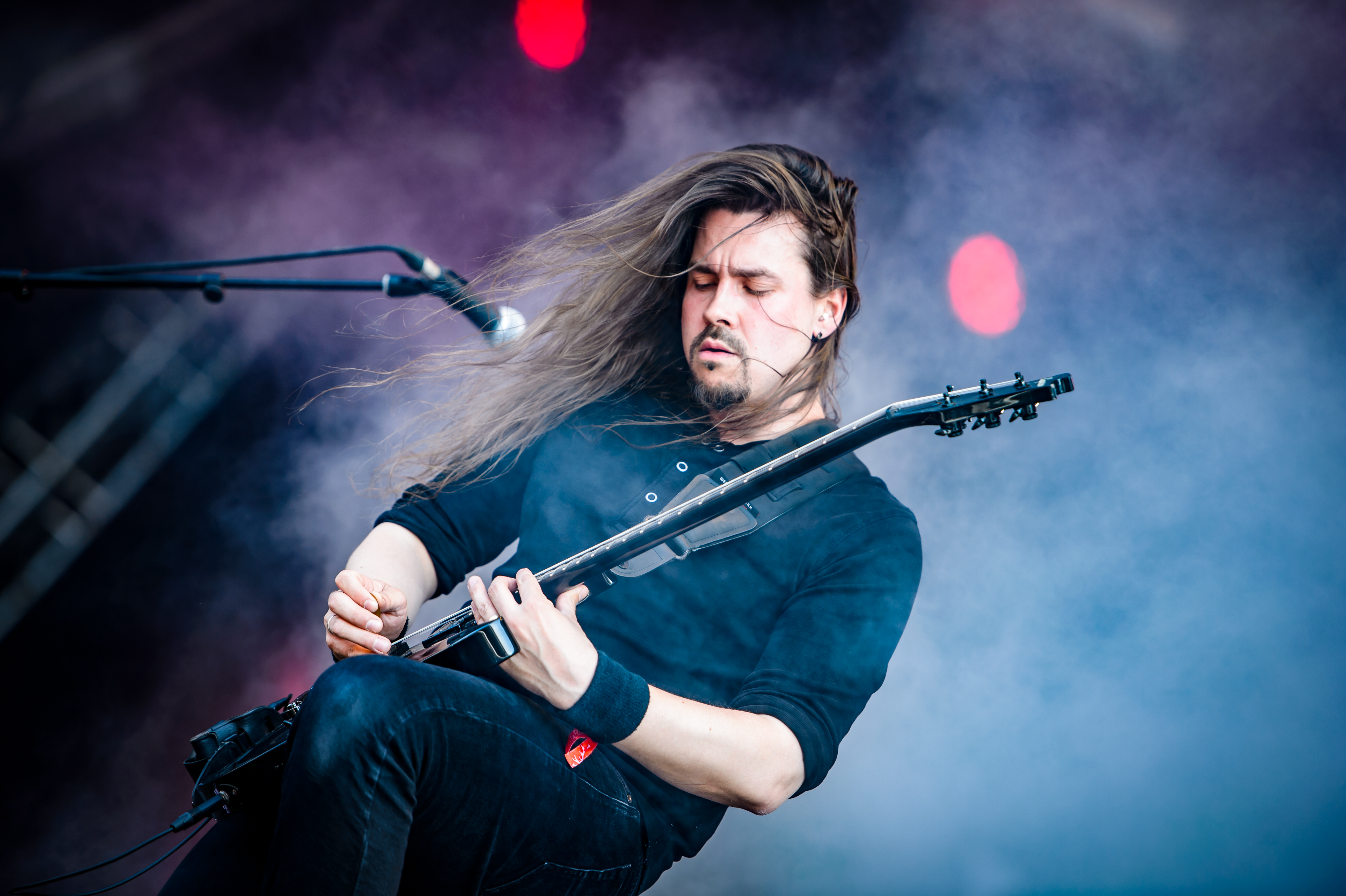 'RockHarz Open Air 2017; Ballenstedt': 'Insomnium'